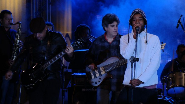 Grupo brasileiro Farofa Carioca em imagem do acervo da TV Brasil.